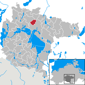 Vielist im Landkreis Müritz, Mecklenburg-Vorpommern